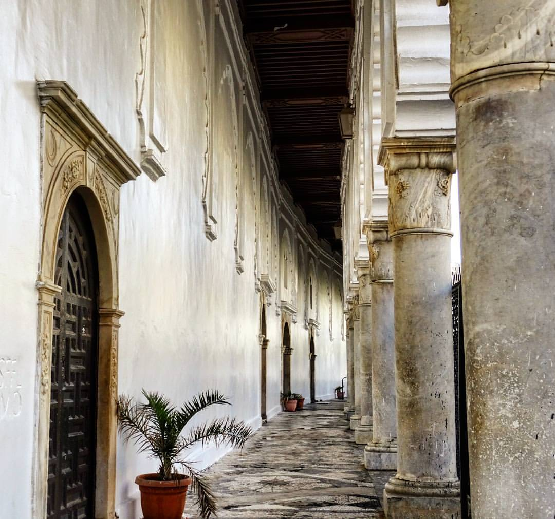 Djamaa el Kebir, la grande mosquée d'Alger